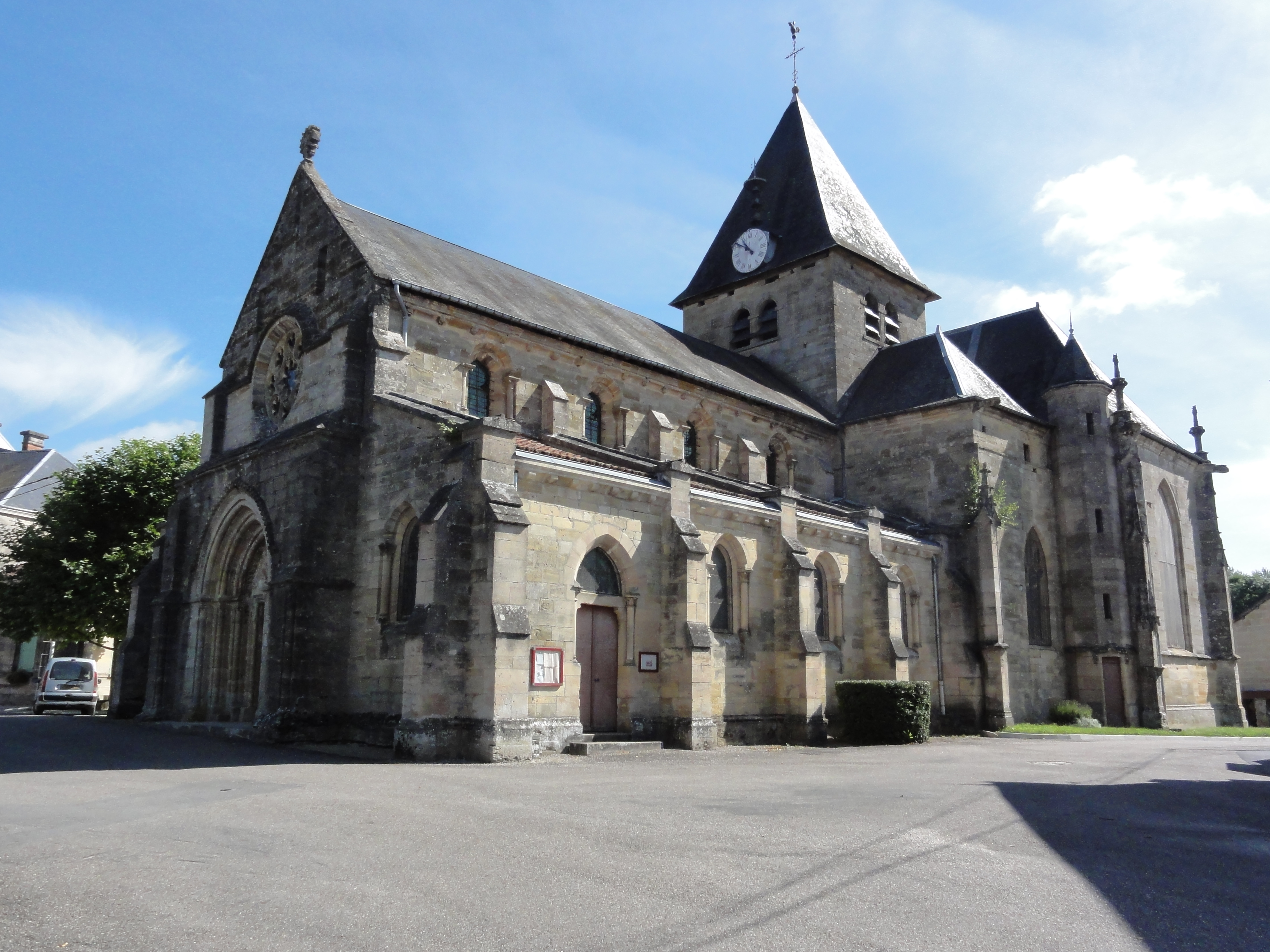 Église Saint-Remi de Mognéville MH .